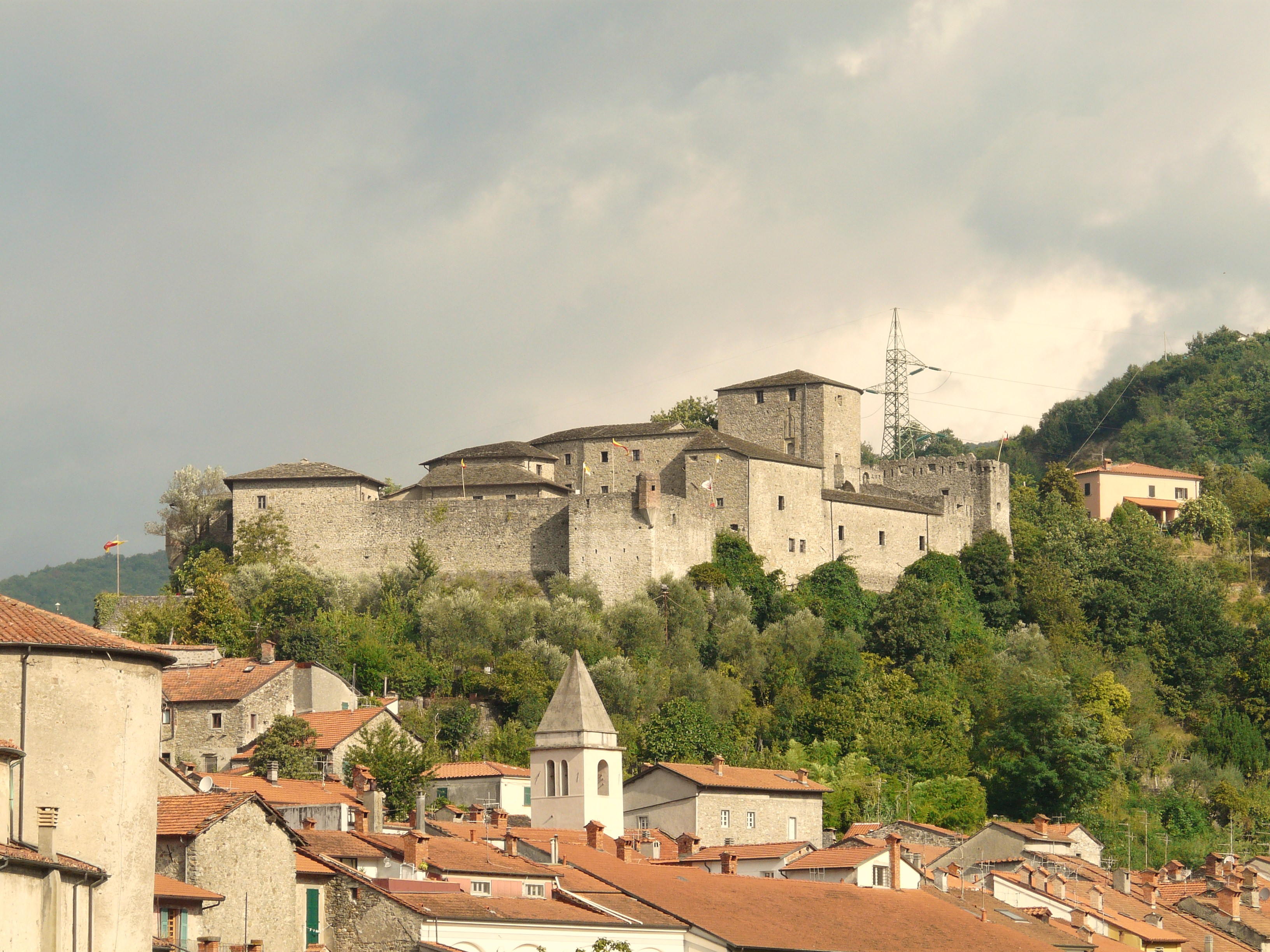 Castello del Piagnaro, Pontremoli, Toscana, Italia